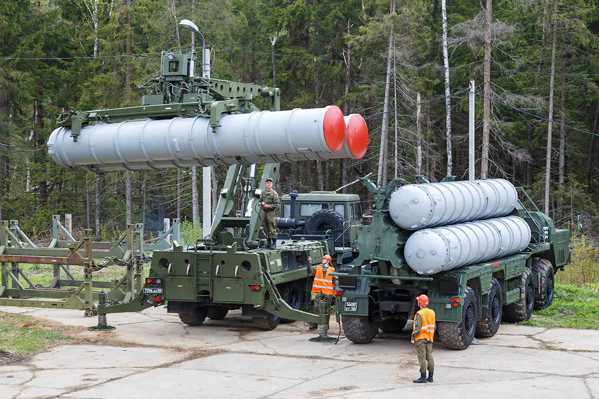 Учения 93-го гвардейского зенитного ракетного полка 4-й дивизии ПВО.